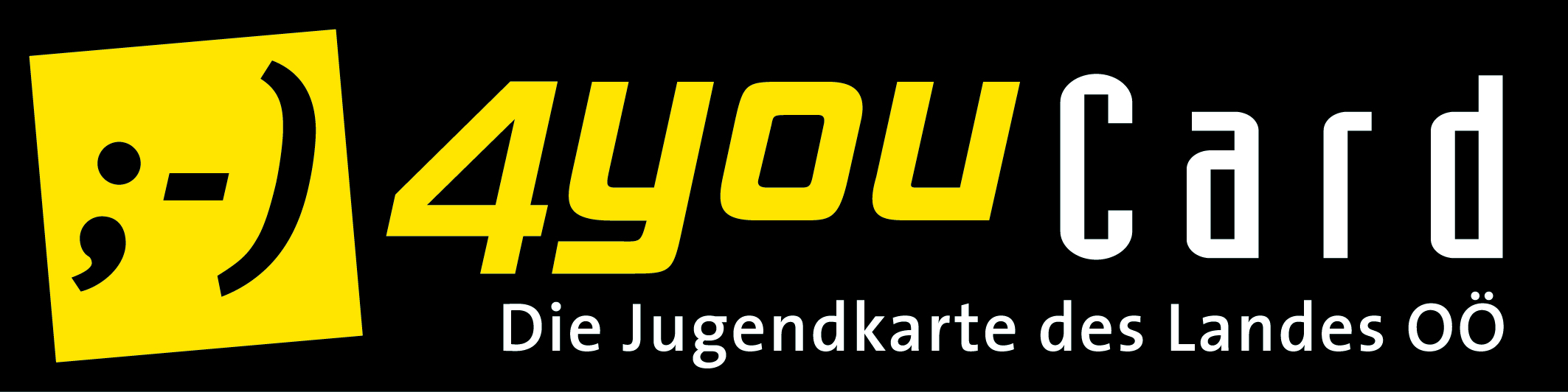 Offizielles Logo der 4youCard - Die Jugendkarte des Landes Oberösterreich